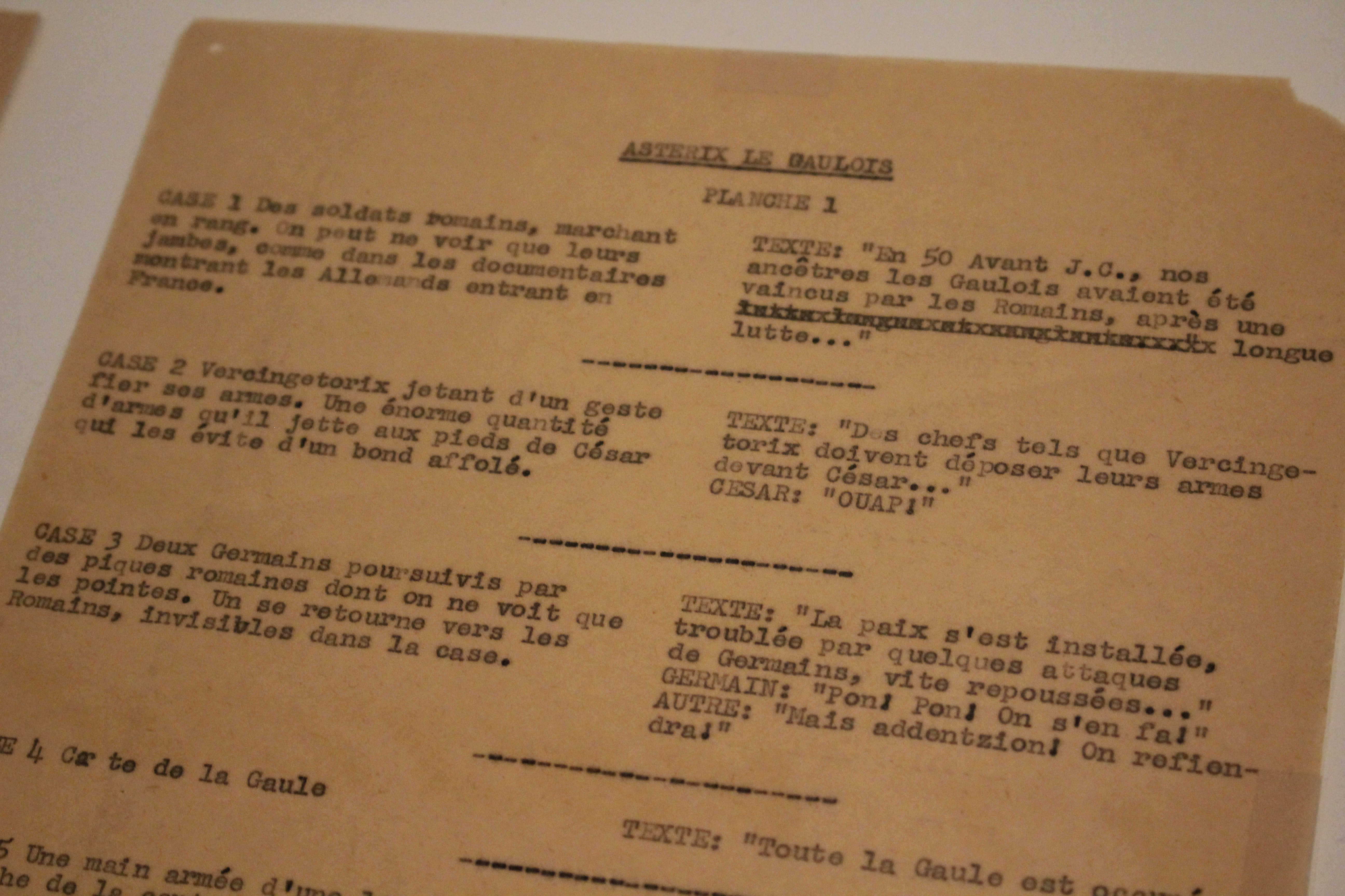 René Goscinny. Au-delà du rire, exposition René Goscinny au Musée d'Art et d'Histoire du Judaïsme, Paris, France.